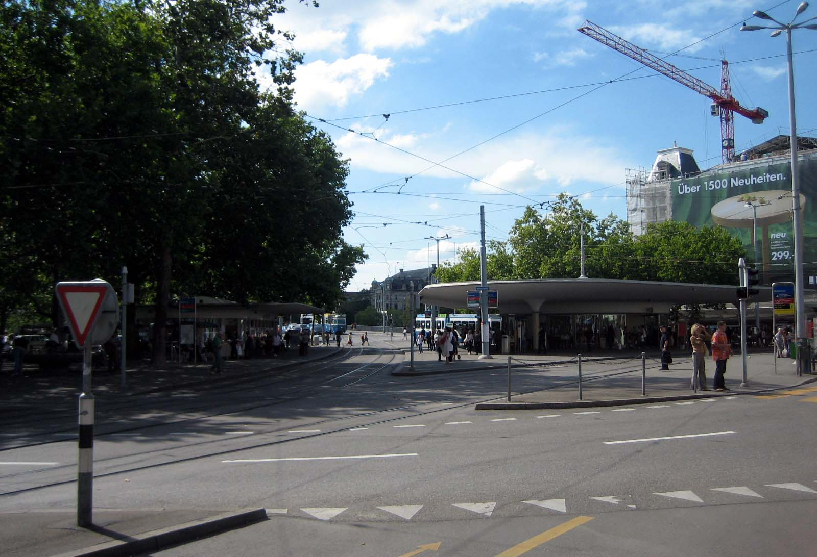 Bellevue Richtung West